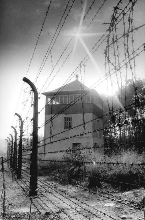 Zum Beitrag: Begegnung mit Buchenwald - Ernst Jende gibt das Vermächtnis weiter ADN-ZB / Ludwig / 25.8.1983 / Stacheldrahtzaun und Wachturm des ehemaligen faschistischen Konzentrationslagers Buchenwald auf dem Ettersberg bei Weimar. Die Nationale Mahn- und Gedenkstätte Buchenwald besteht im September 25 Jahre und wurde in dieser Zeit von mehr als zehn Millionen Menschen aus aller Welt besucht. (Zu diesem Thema gehören die Fotos 1983-0825-300 bis 303N!)